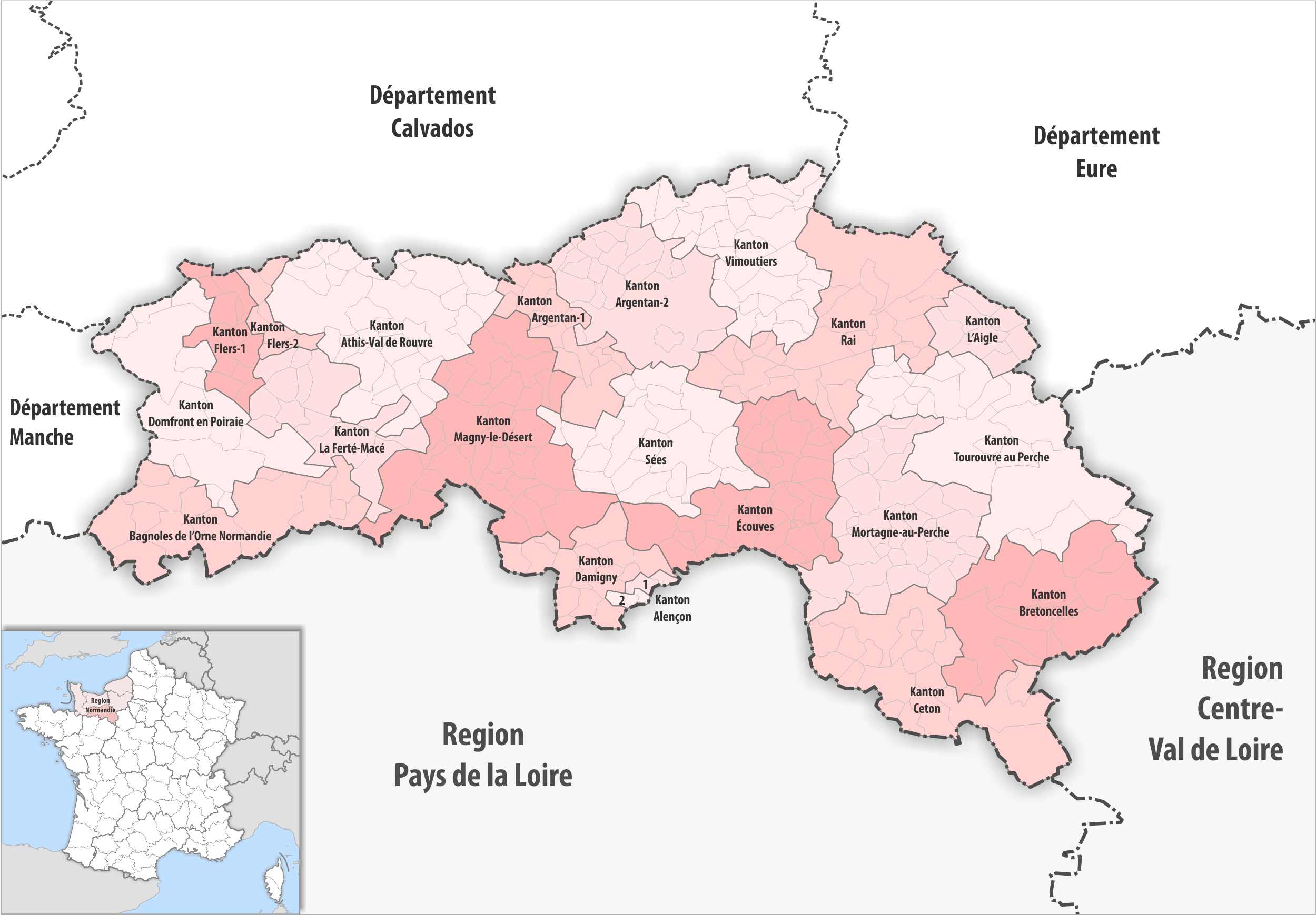 Gemeinden und Kantone im Departement Orne